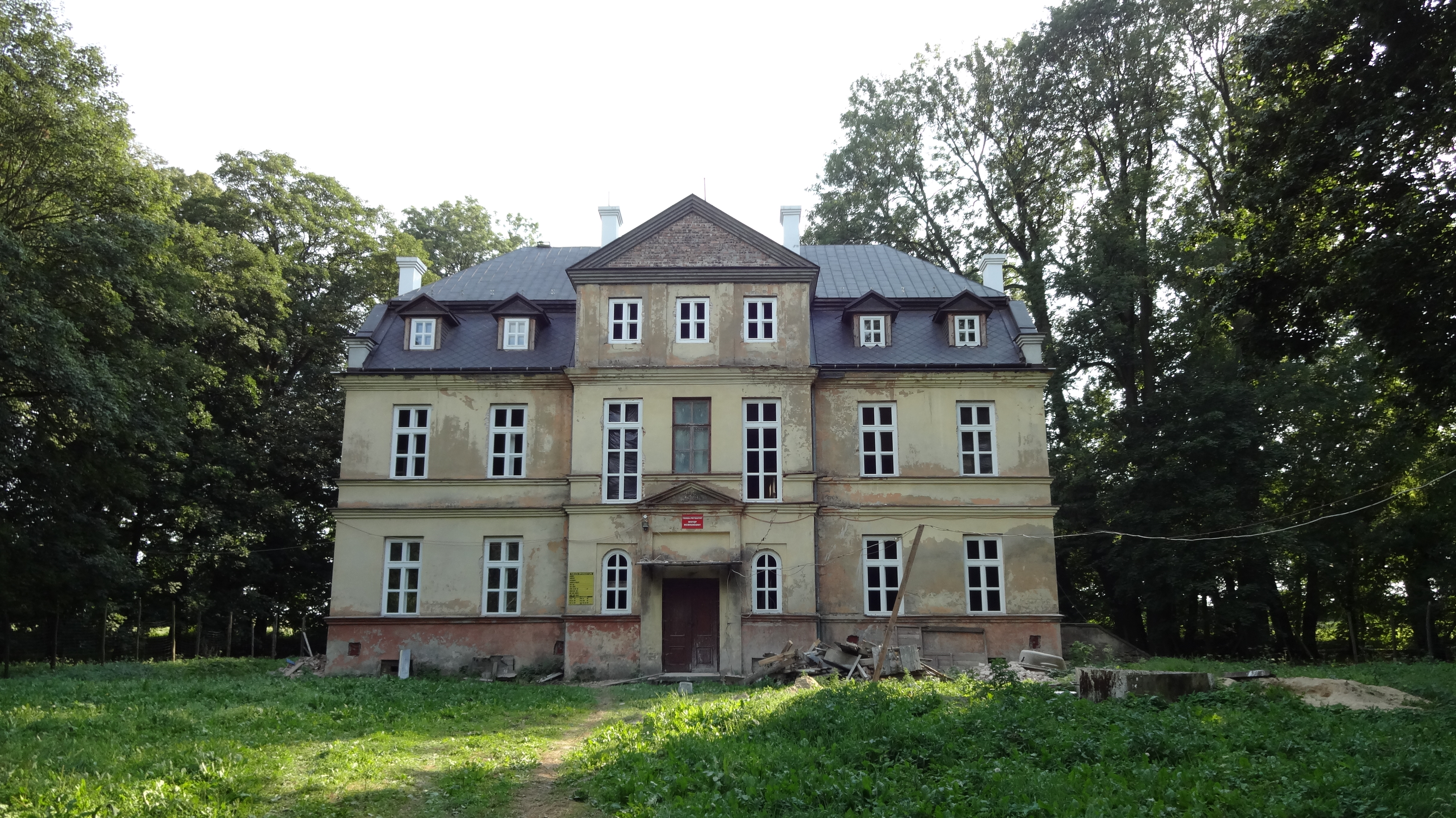 Siedliska - zespół pałacowy: pałac